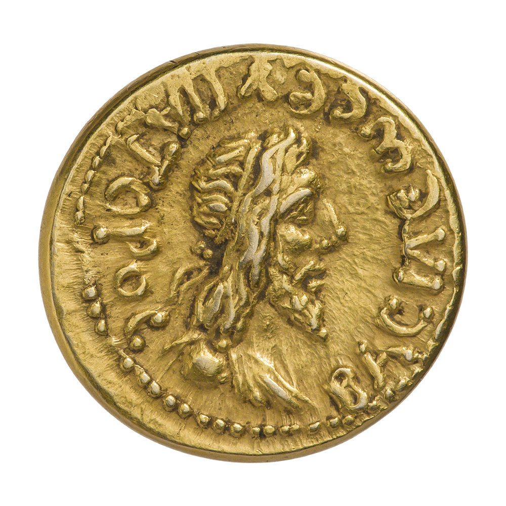 Боспорское царство. Евпатор (154—170). Статер. Ок. 162 г. Аверс. Круговая надпись ВАСIΛEωC EVПАТОРОС. Бюст Евпатора, вправо. Точечный ободок.